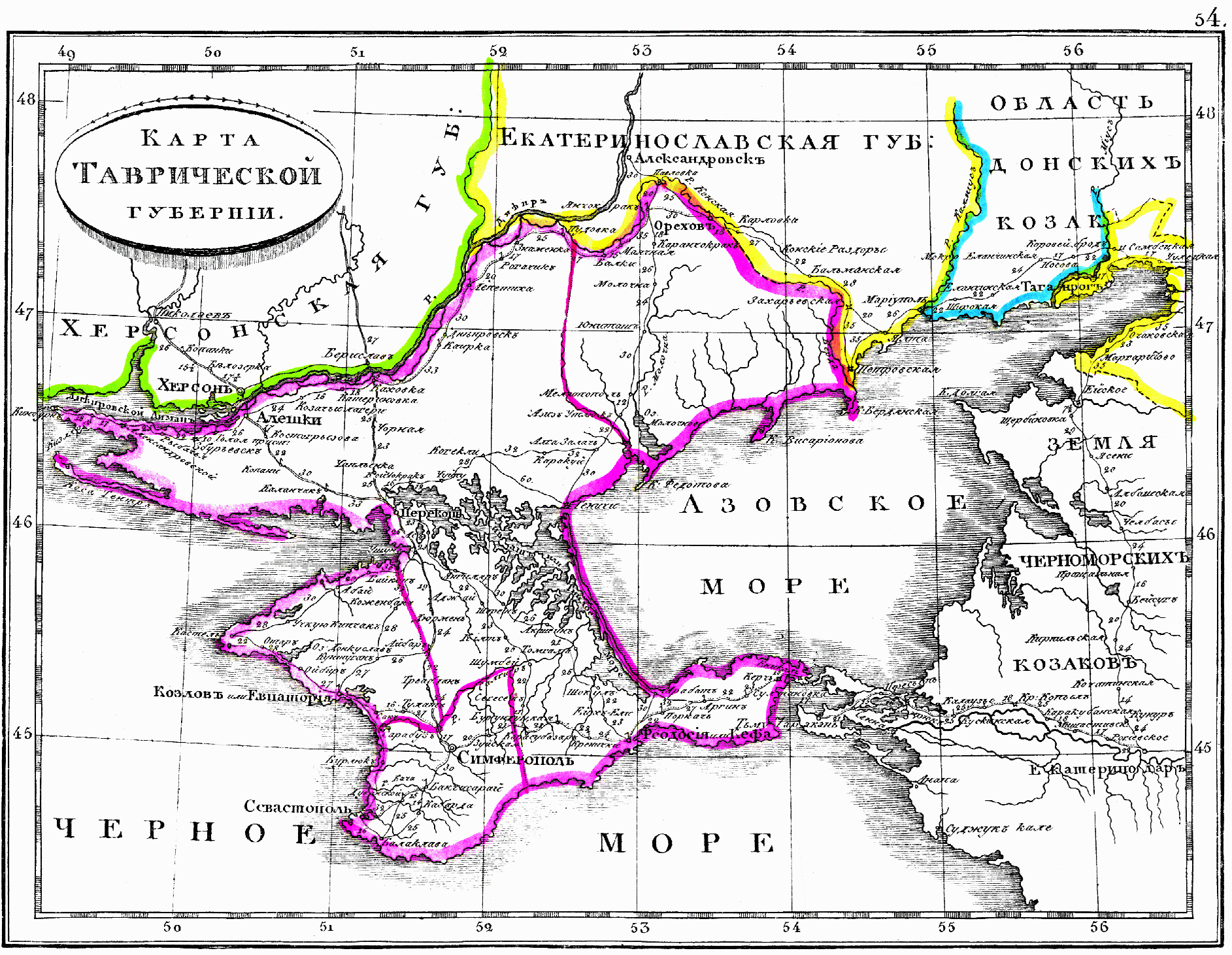 Карта Таврической губернии, 1835